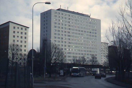 Höghuset Ostkupan i Kallebäck, Göteborg